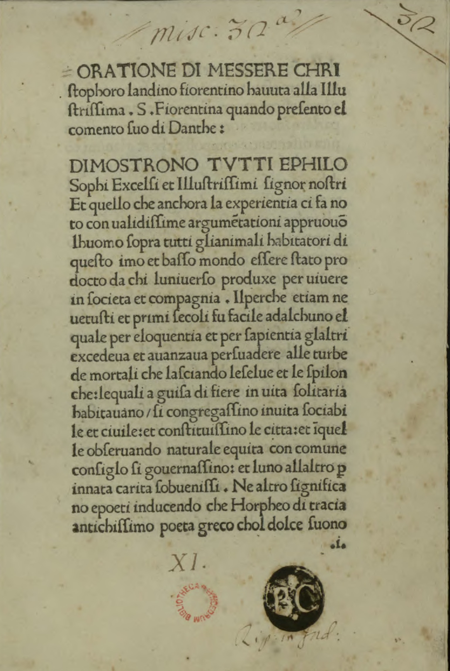 Orazione alla Signoria Fiorentina quando presentò il suo Commento di Dante. - [Firenze] : [Niccolò di Lorenzo], [dopo il 30 agosto 1481]. - 6 c . ; [*]⁶ ; 8° . Oratione di messere..